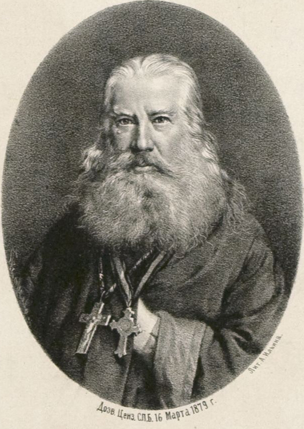 Борель П.Ф., Портрет протоиерея Василия Анастасьевича Бандакова : [Эстамп]. - 1879. - 1 л. : Литография ; 12,5х9,2; 27,8х18,9 см см